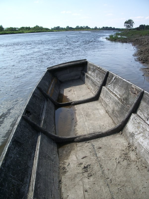 Granne (woj podlaskie) Bug